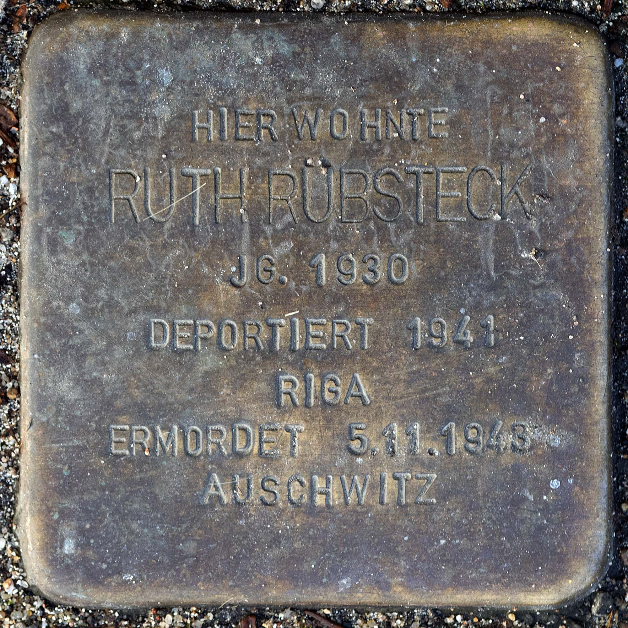 Stolperstein für Ruebsteck Ruth